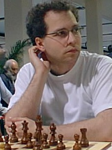 GM Christopher Lutz, Istanbul (ol) 2000